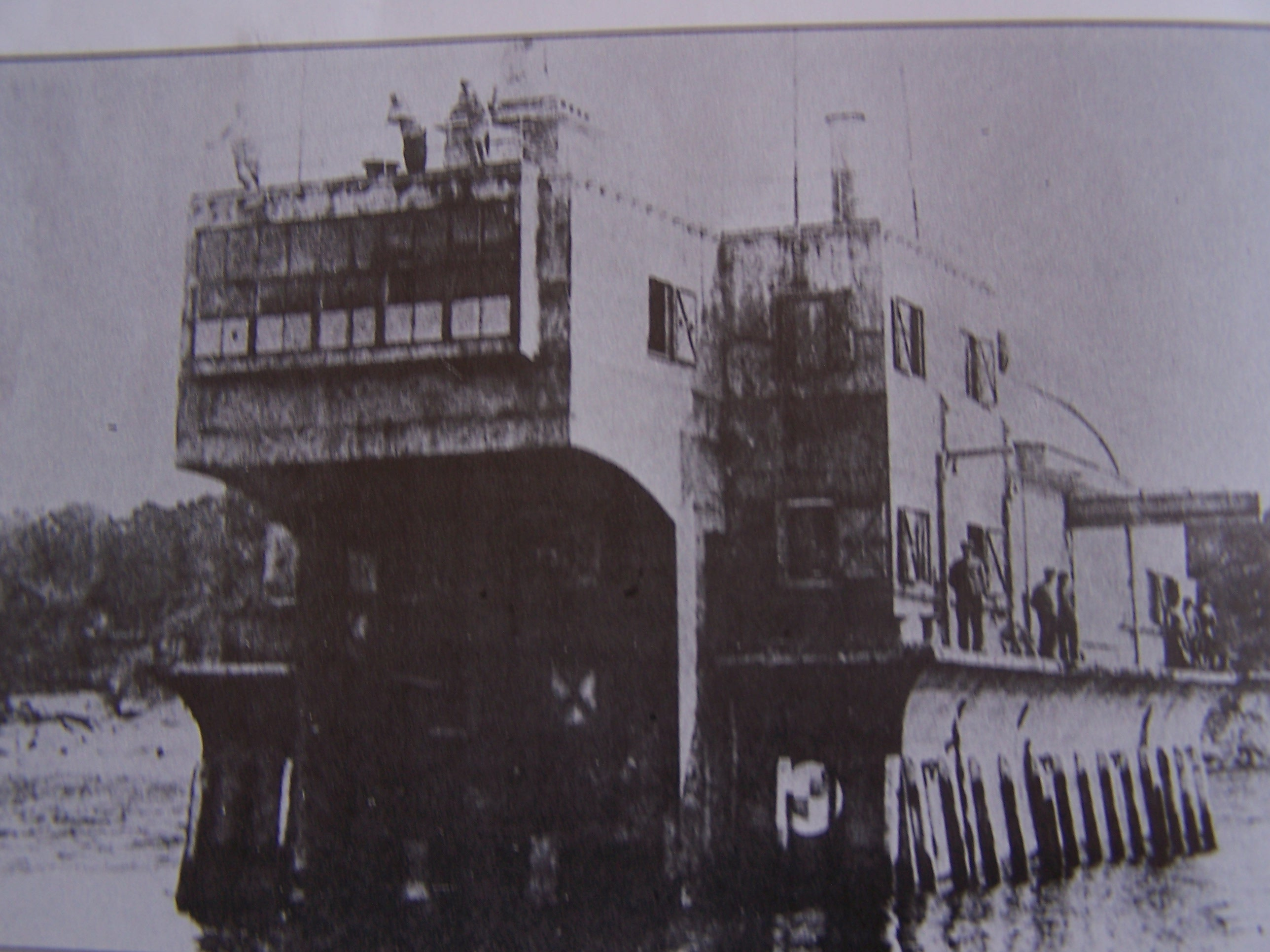 Photo de la plateforme lance-torpilles